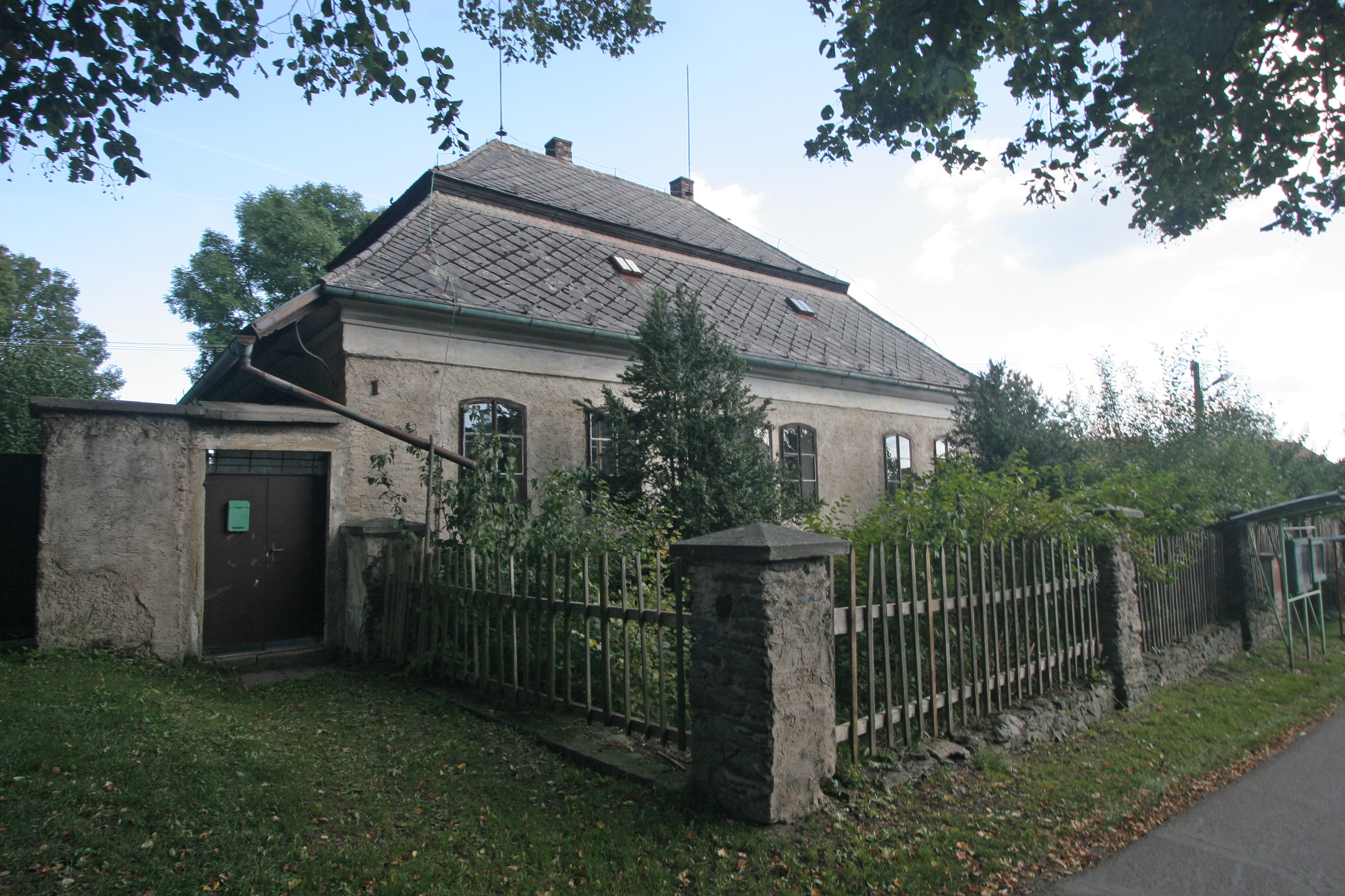 Míčov čp. 1